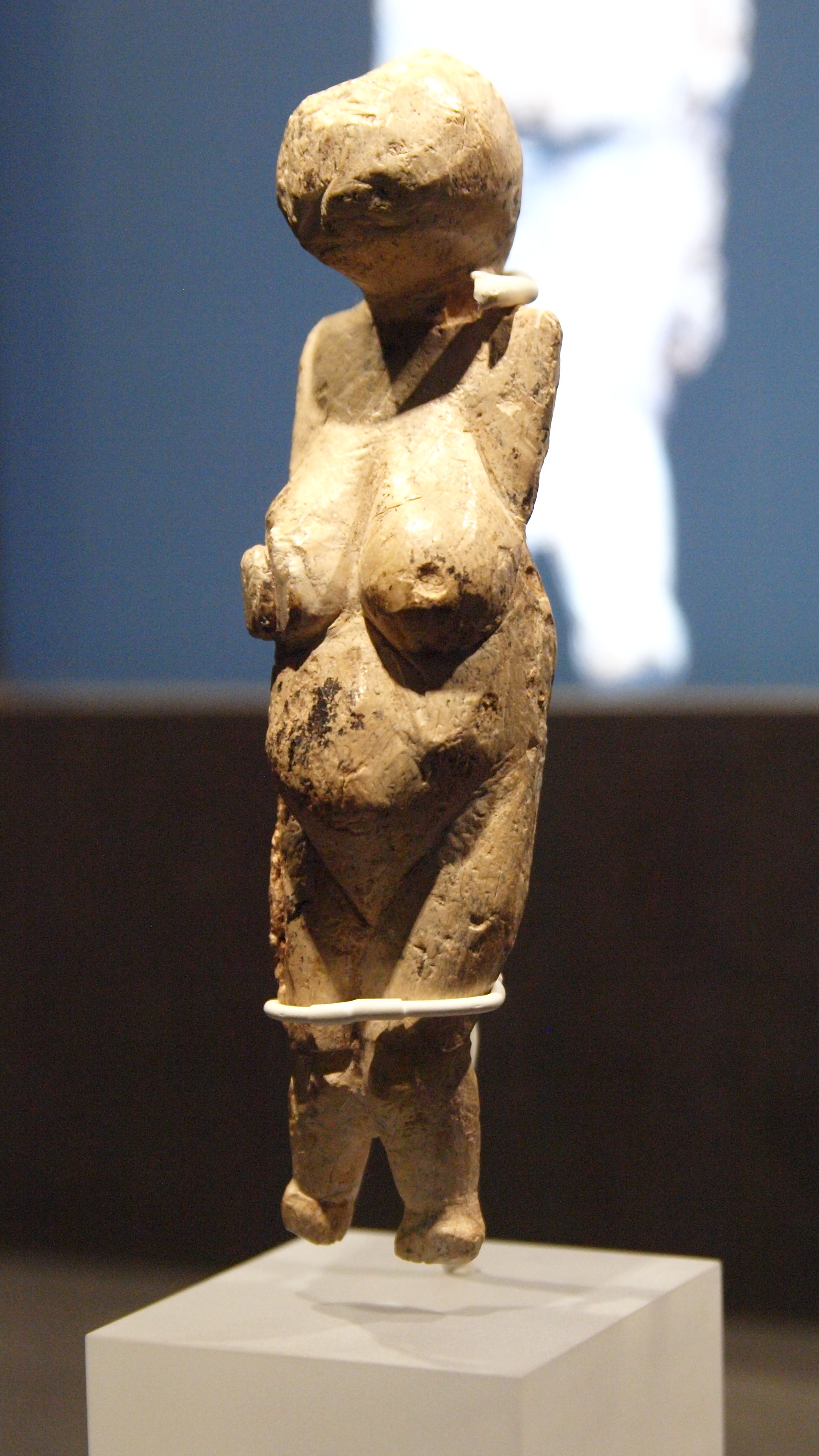 Frauenstatuette von Kostenki, Mammutelfenbein, Gravettien ca. 25.000 BP, Original, ausgestellt im Archäologischen Museum Hamburg (Eiszeiten - Die Kunst der Mammutjäger vom 18. Oktober 2016 bis 14. Mai 2017). Aufbewahrungsort sonst Kunstkammer Sankt Petersburg, Russland.